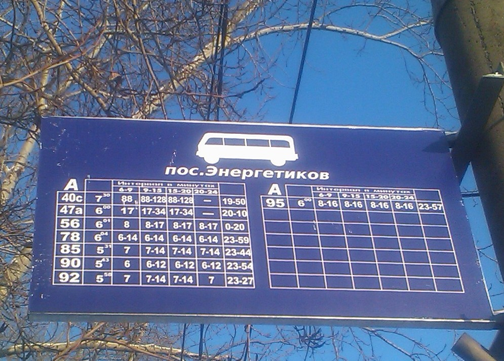 Поселок Енергетиків